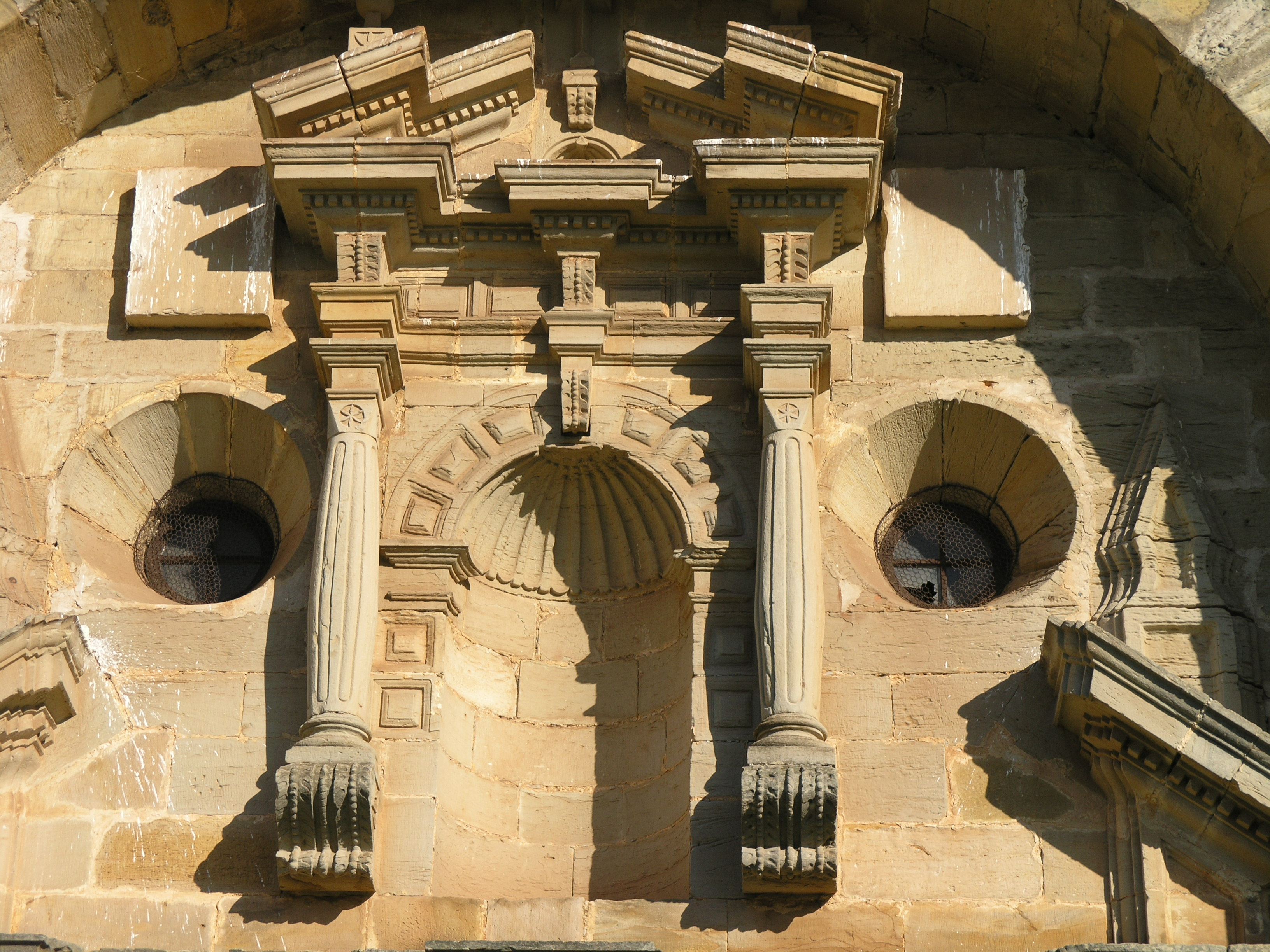 Detalle del frontón partido superior, con hornacina y óculos a los lados. Portada oeste de la Iglesia de San Martín de Cigüenza, en Alfoz de Lloredo, Cantabria, España. Barroco de mediados del siglo XVIII.